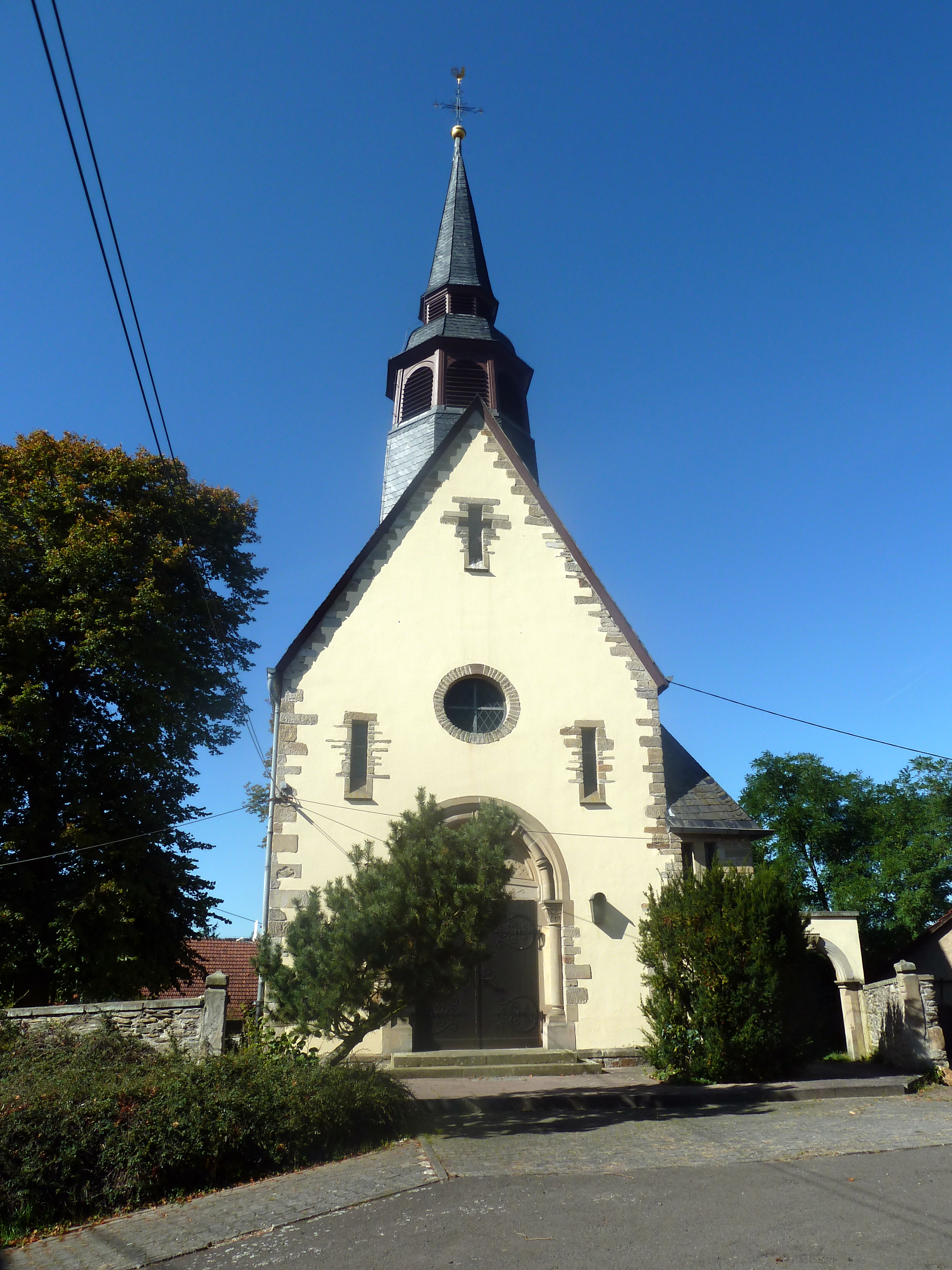 Ev. Kirche in Gebroth. Erbaut um 1906 durch August Senz